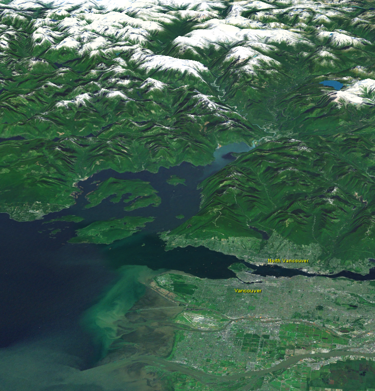 Horseshoe Bay, l'embouchure de la Squamish, et la ville de Vancouver.